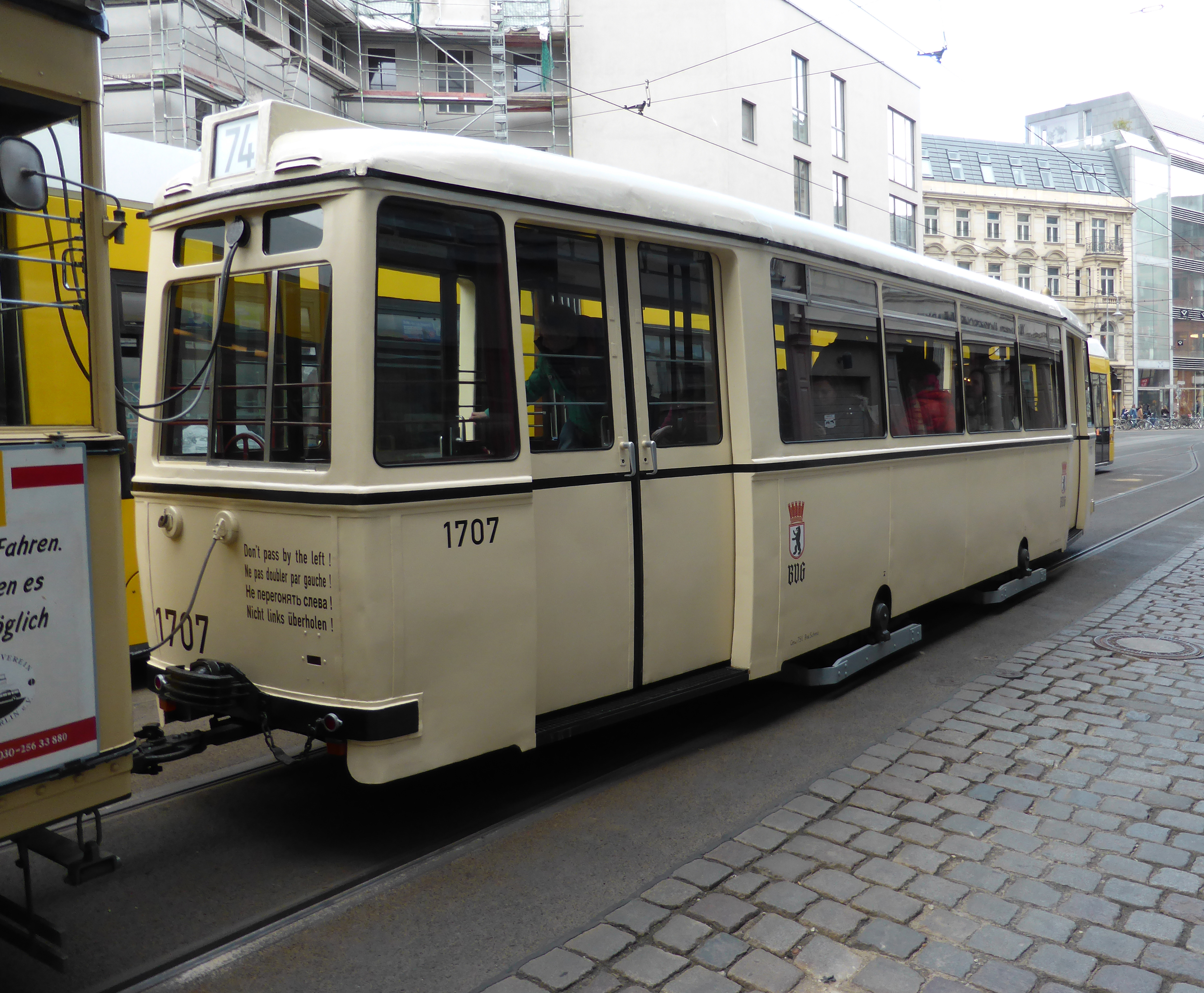 Historische Straßenbahn Berlin.